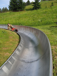 ha summer bobslight